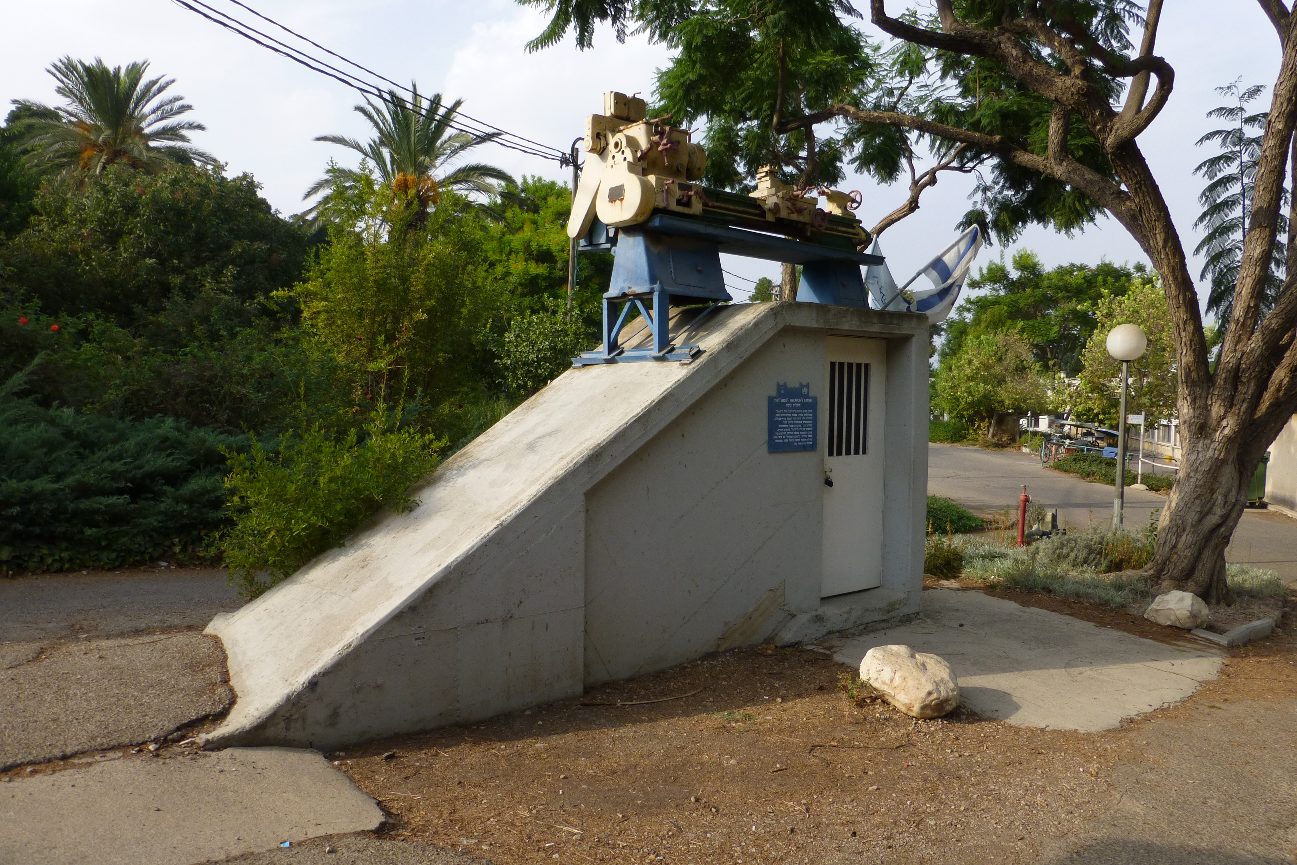 הסליק בקיבוץ יגור, סליק ארצי - נבנה בשנים 1937 - 1938. זה היה הסליק המרכזי בצפון הארץ. הסליק התפרסם כשנתגלה בעת חיפוש שנערך בקיבוץ בזמן השבת השחורה ב-29 ביוני 1946. הבריטים חפשו במשך מספר ימים בעזרת כלבים ומגלי מתכות ולבסוף גילו את הסליק המרכזי ועוד 25 סליקים קטנים. הנשק שהיה בסליקים הוחרם וחלק מחברי הקיבוץ נאסרו. זה היה אחד הסליקים הגדולים שבו נתפסו כ- 80 מרגמות 52 מ"מ, עשרות רובים תת-מקלעים ותחמושת רבה. הסליק המרכזי שנותר ריק לחלוטין מאז השבת השחורה, שוחזר ושופץ בשנת 1983 במסגרת חגיגות ה- 60 לקיבוץ.